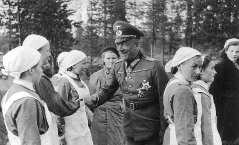 Scherl Bilderdienst, 7549-41